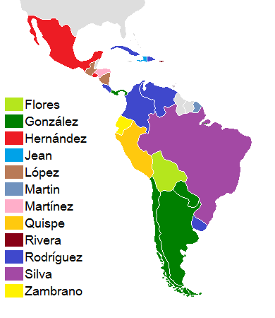 Apellidos en América Latina